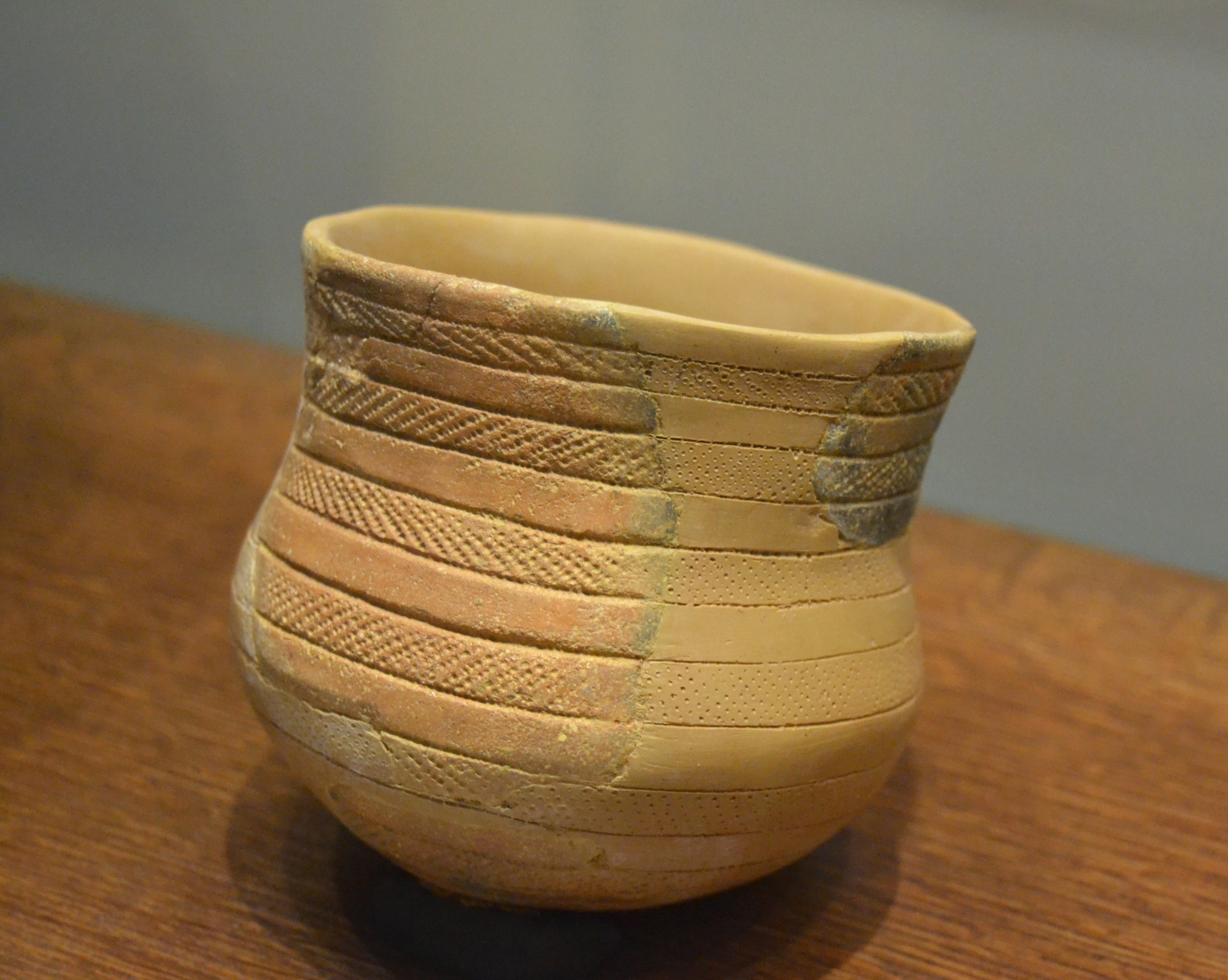 Vas campaniforme amb decoració puntejada, cova de la Recambra, Museu Arqueològic de Gandia.